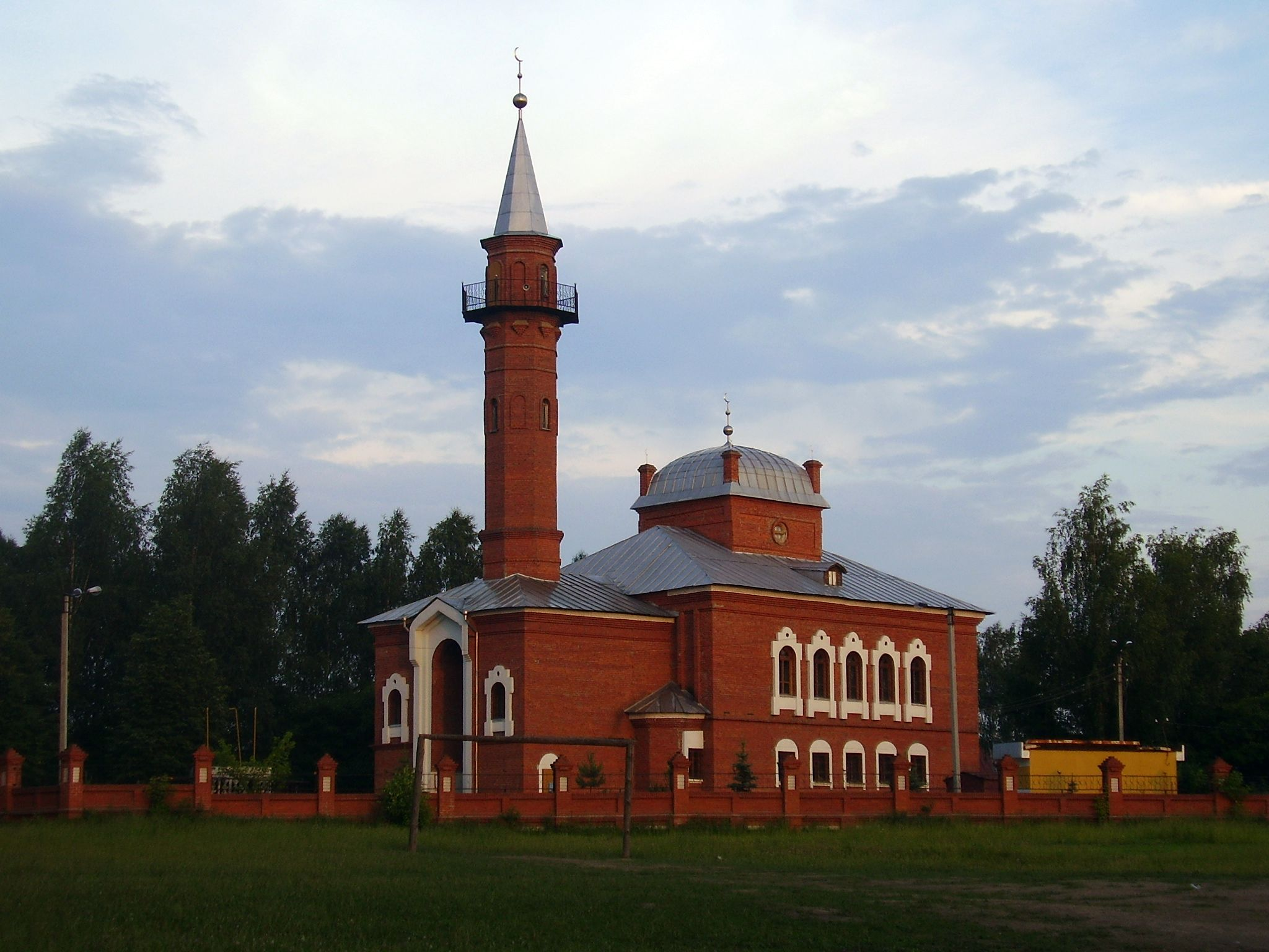 Мечеть в городе Йошкар-Ола. Построена в конце 90-х годов XX века на средства местных мусульман (главным образом татары).